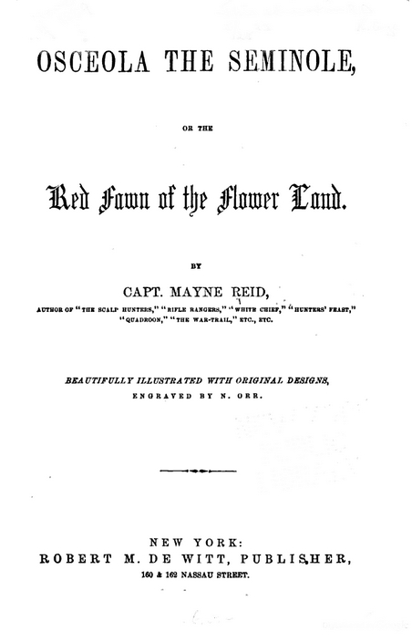 Titelsidan till romanen Osceola av Thomas Mayne Reid.